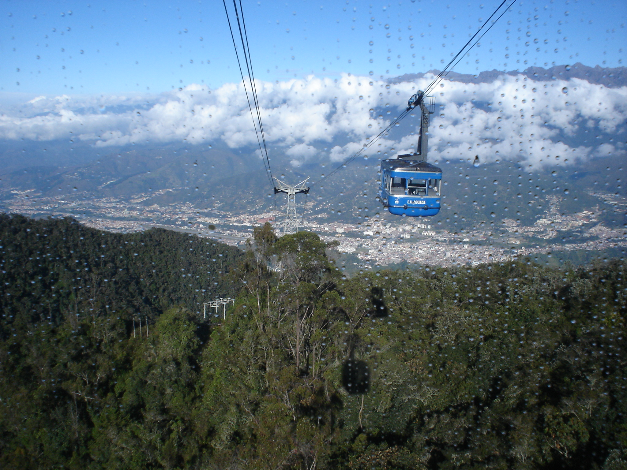 Panoramica de la ciudad de Mérida desde el tramo La Montaña - La Aguada del Sistema Teleferico de Mérida, Venezuela